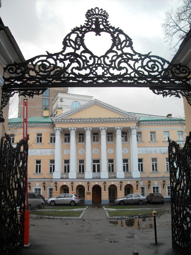 near Усадьба Третьяковых